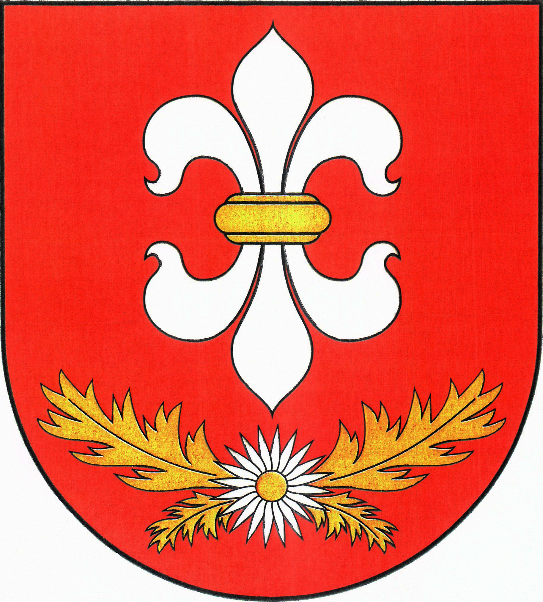 Herb gminy Baligród.